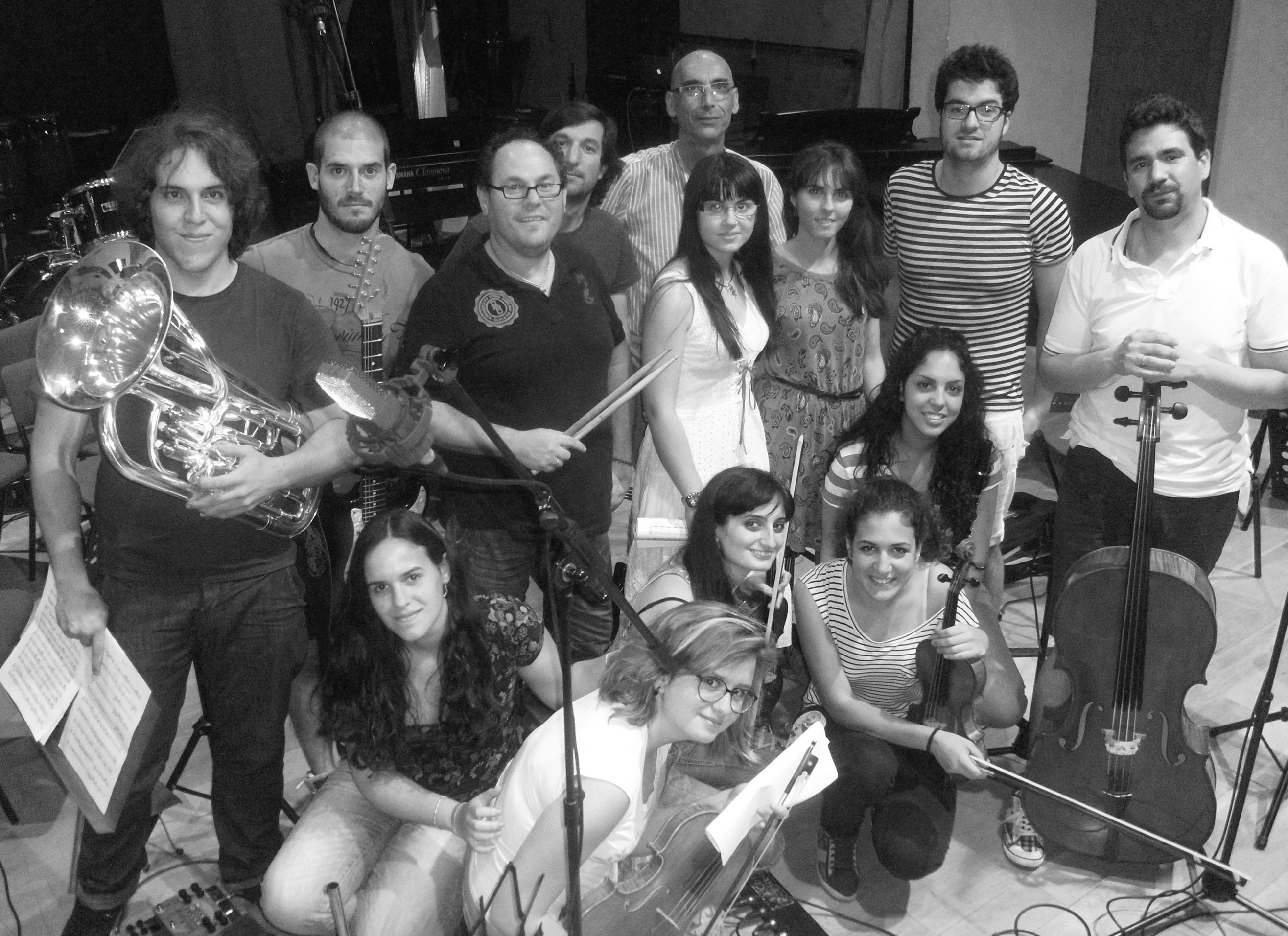 Ensemble KinematikoM y su director, Ortiz Morales, en 2012. Grabación del disco Música Inútil.